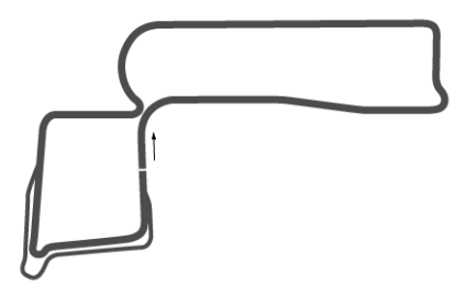 Flugplatz Rennstrecke Lahr